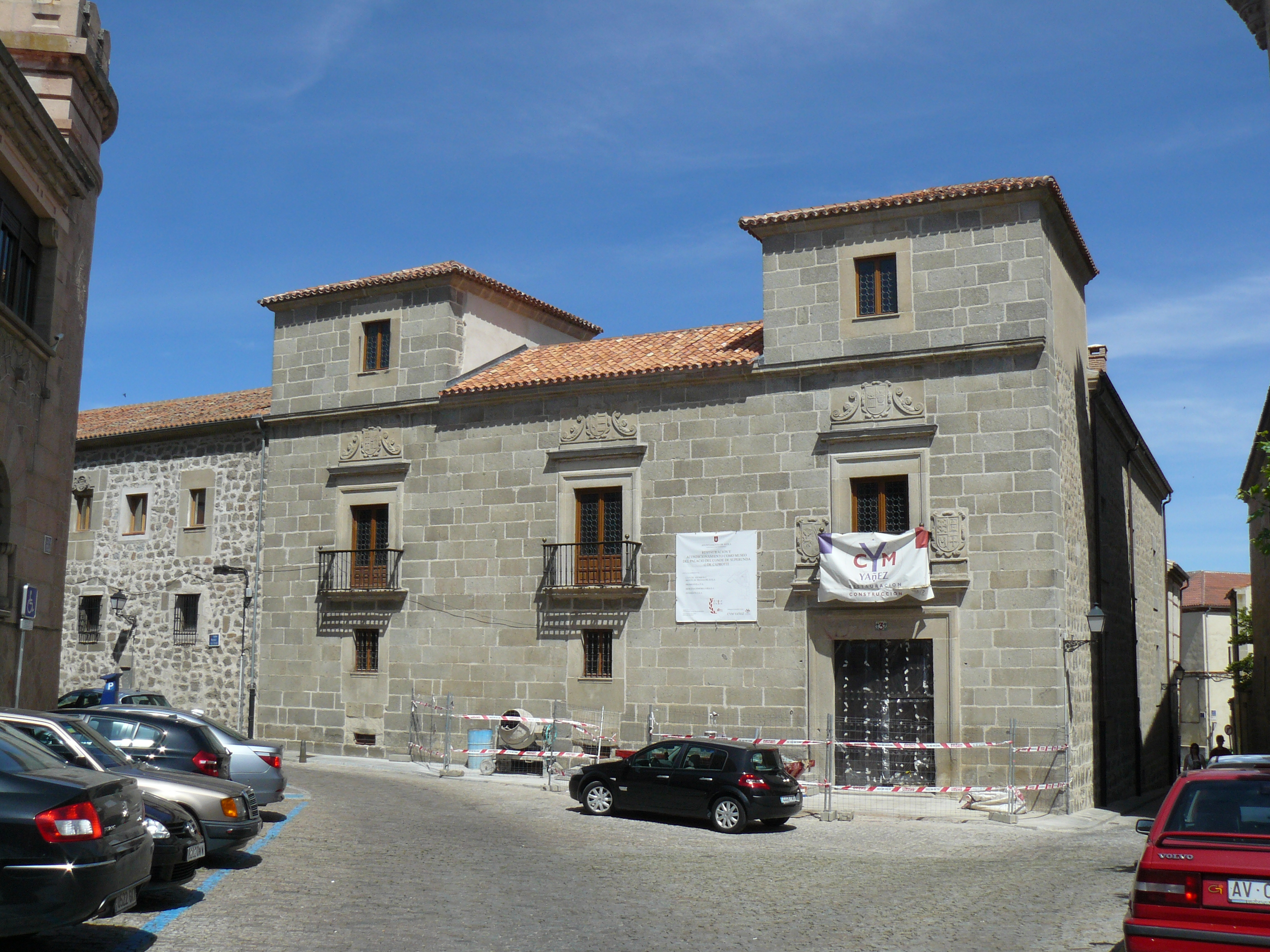 Mansión de los Superunda, Ávila.